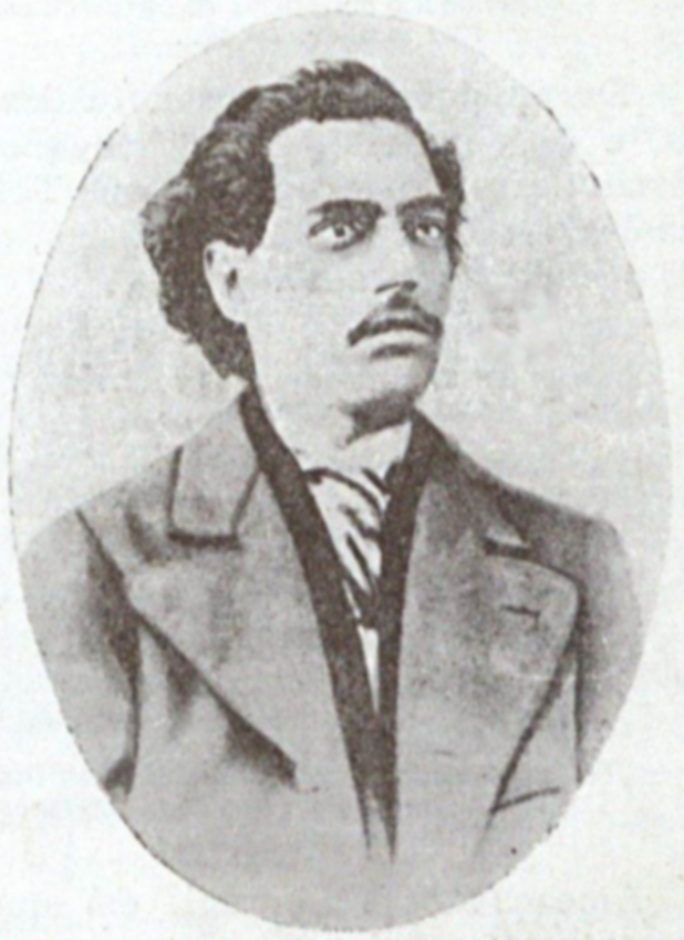 Fotografia do poeta brasileiro Antônio Frederico de Castro Alves, quando aluno da Faculdade de Direito do Largo de São Francisco, em São Paulo (publicada no primeiro número da revista carioca "Bahia Illustrada").